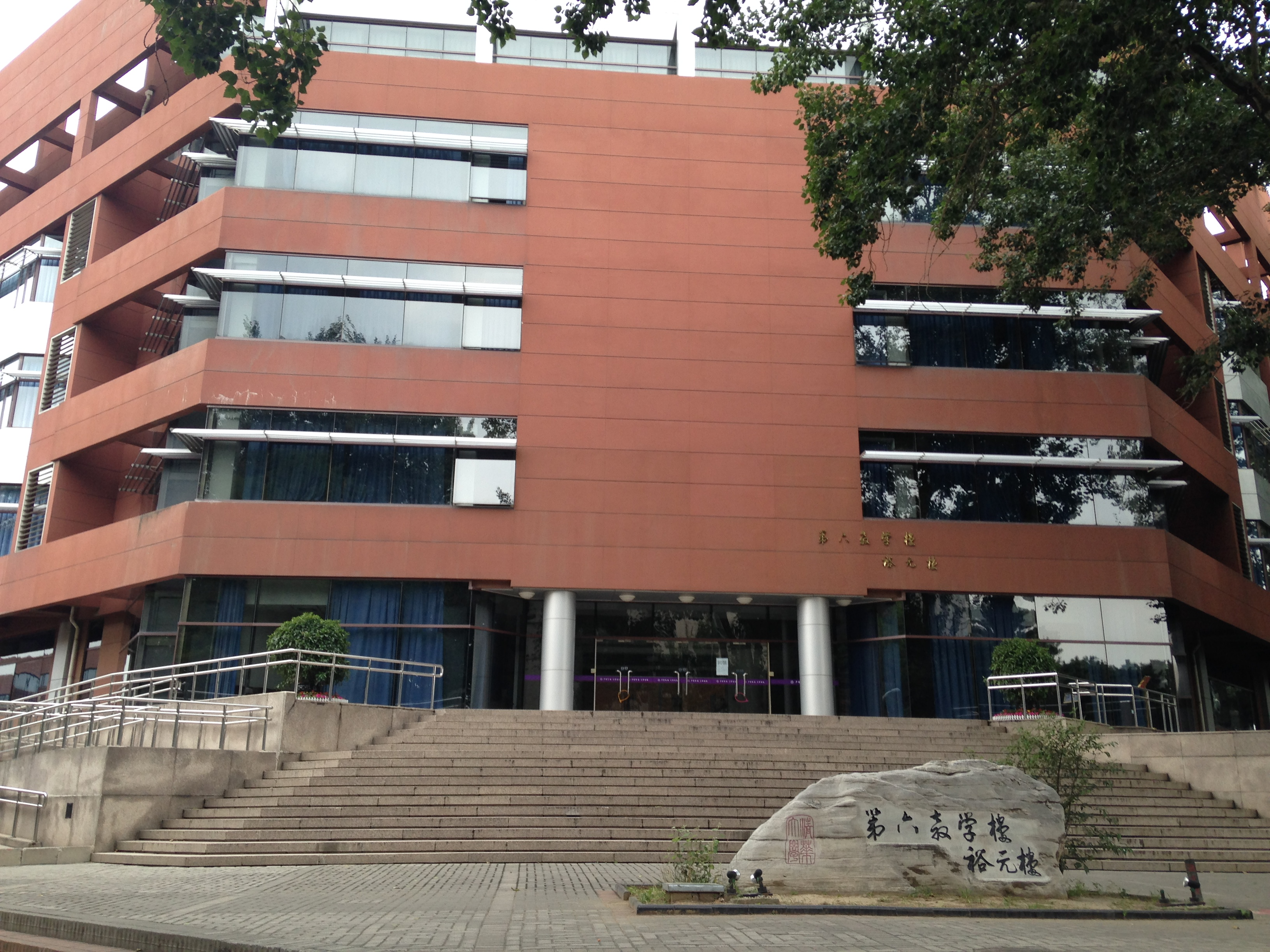 清華大学・第六教室楼